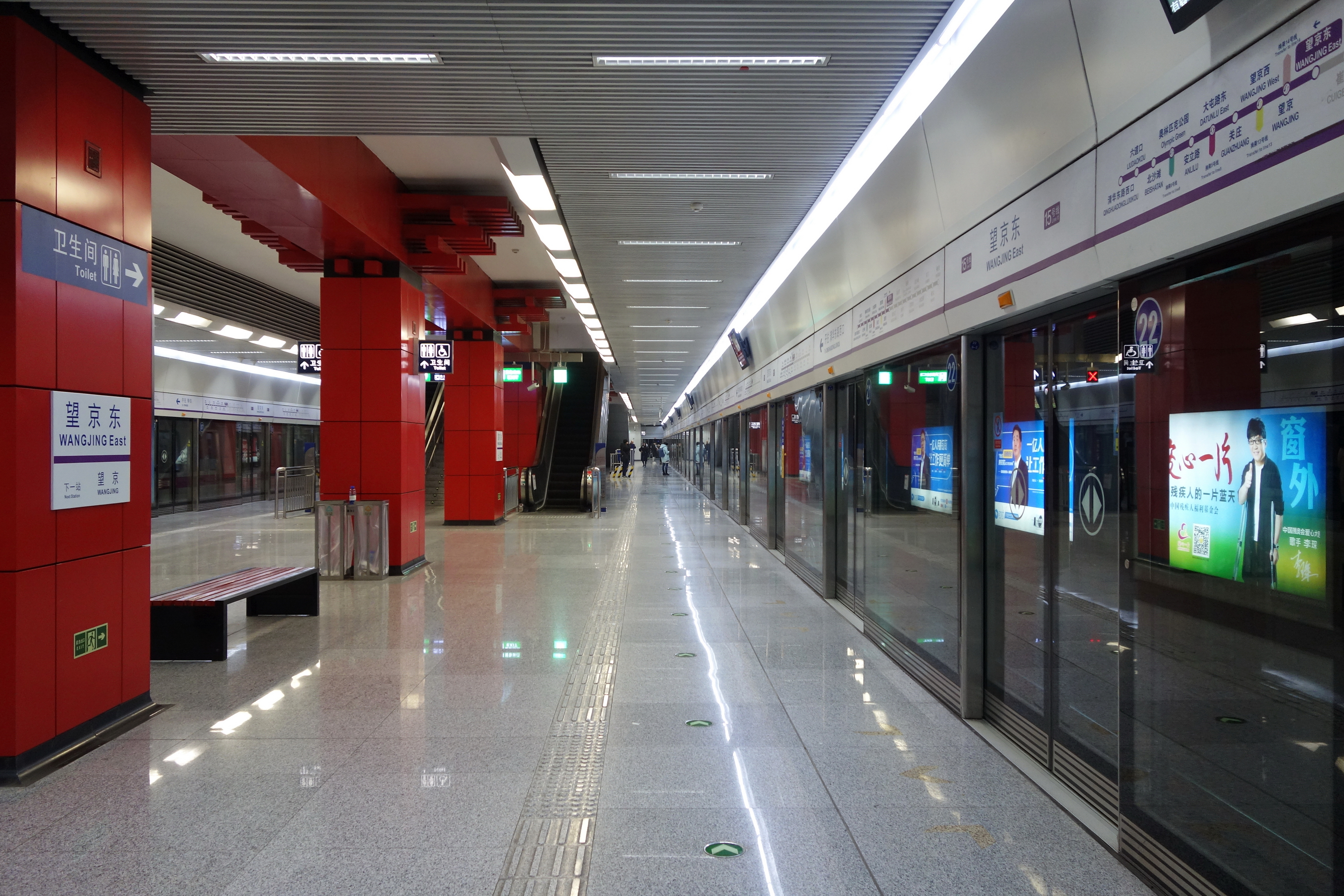 北京地铁15号线望京东站岛式站台